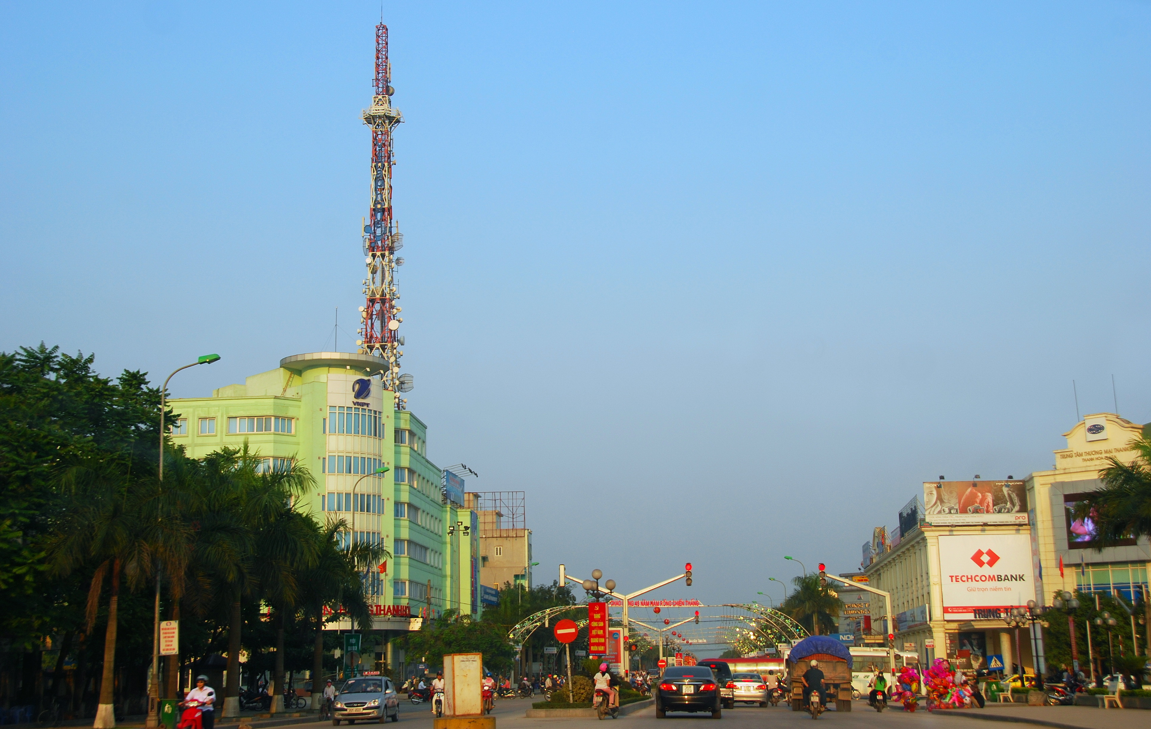 Улицы в городе Тханьхоа